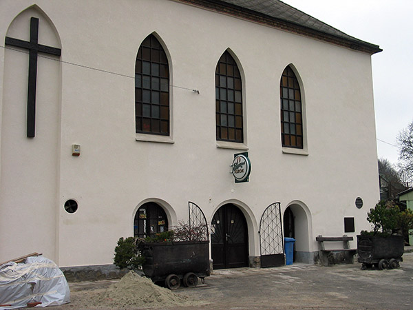 A kocsma és a római katolikus templom közös épülete Brennbergbányán (Sopron, Magyarország)